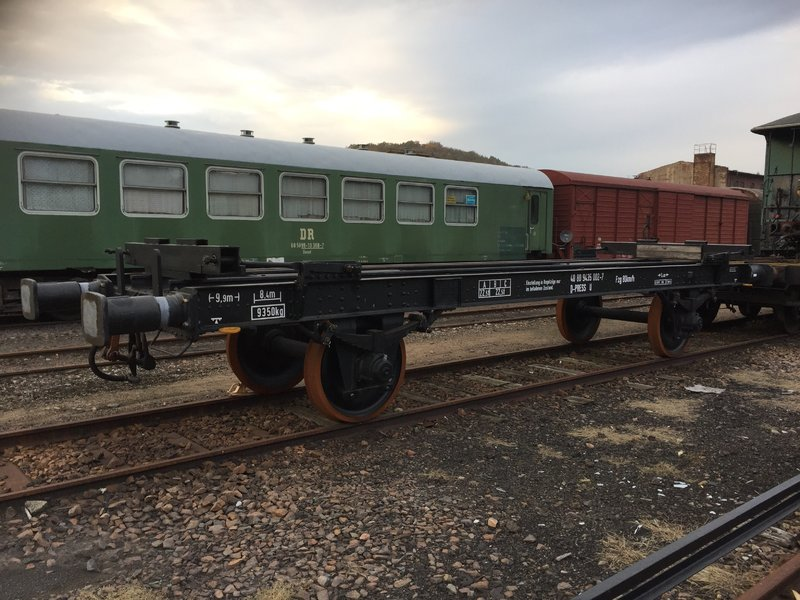 Zweiachsiger Schmalspurtransportwagen im Bahnhof Freital-Hainsberg (20. Oktober 2017)